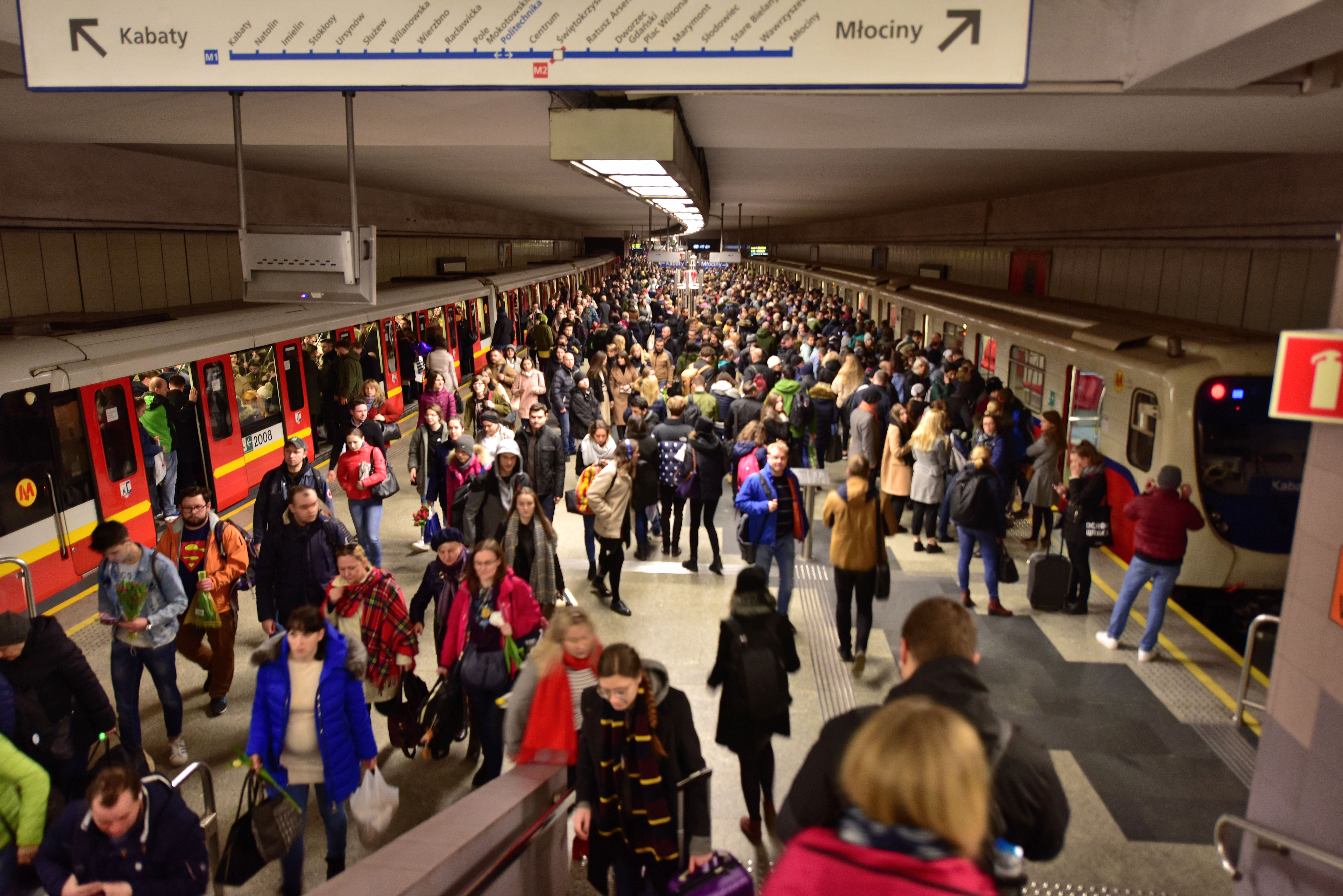 Stacja metra Politechnika w Warszawie